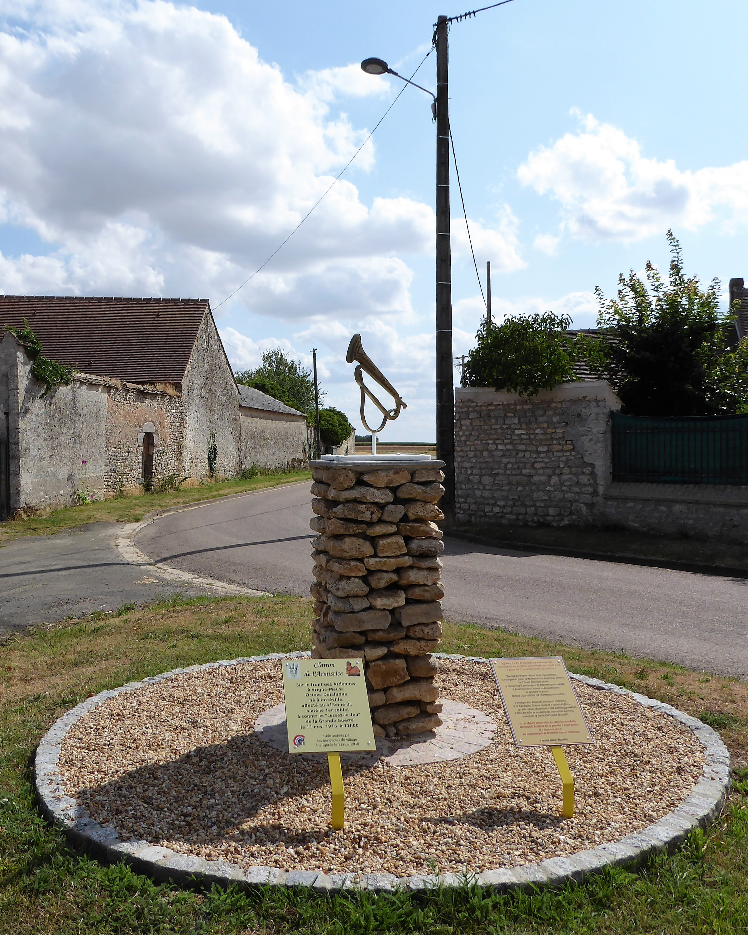 hommage au cessez-le-feu sonné par Octave Delaluque, enfant du pays, le 11 novembre 1918 à 11 heures, Intréville, Eure-et-Loir, France.